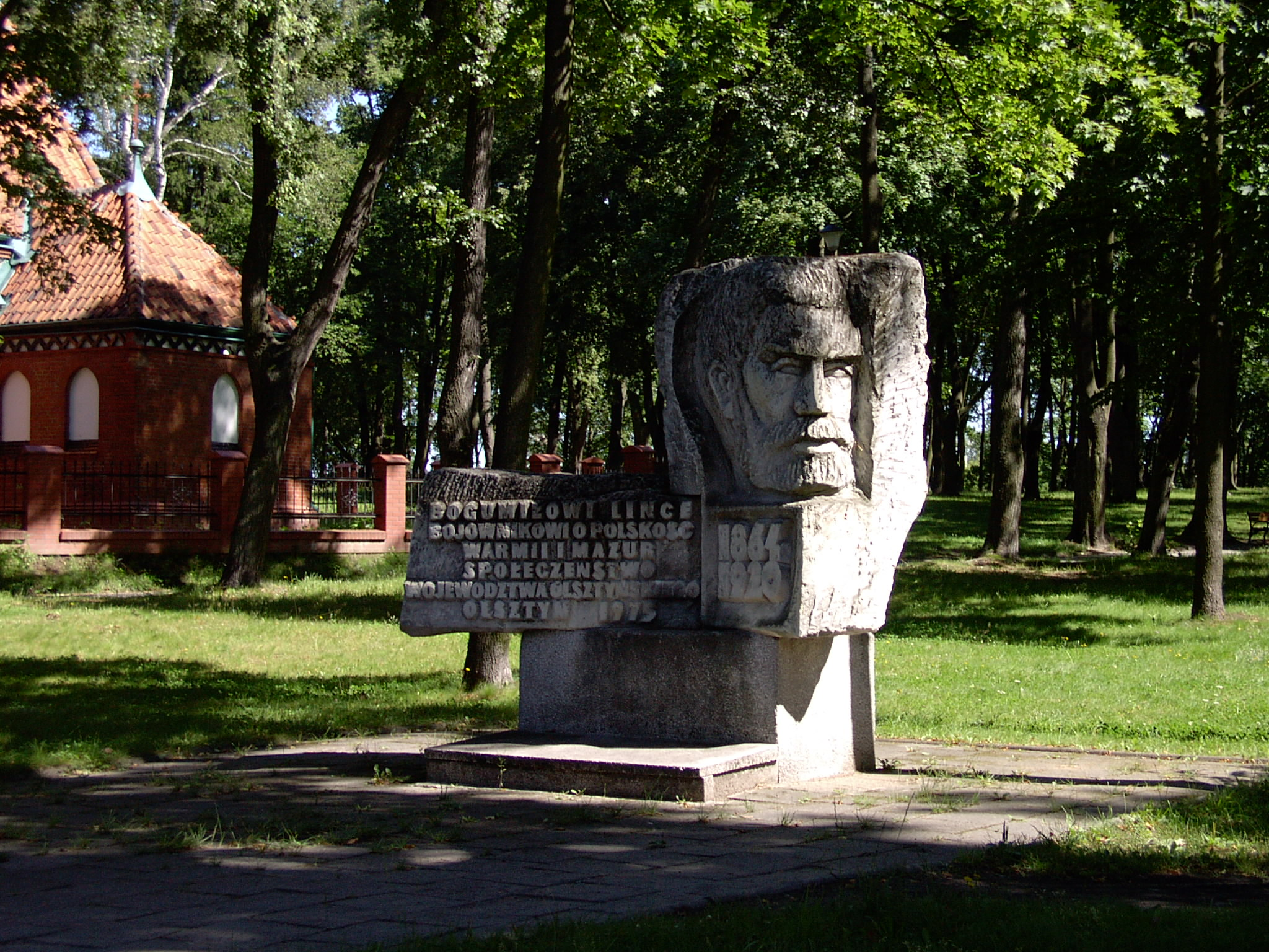 Pomnik Bogumiła Linki w Olsztynie, w tle park po dawnym cmentarzu (Zatorze)